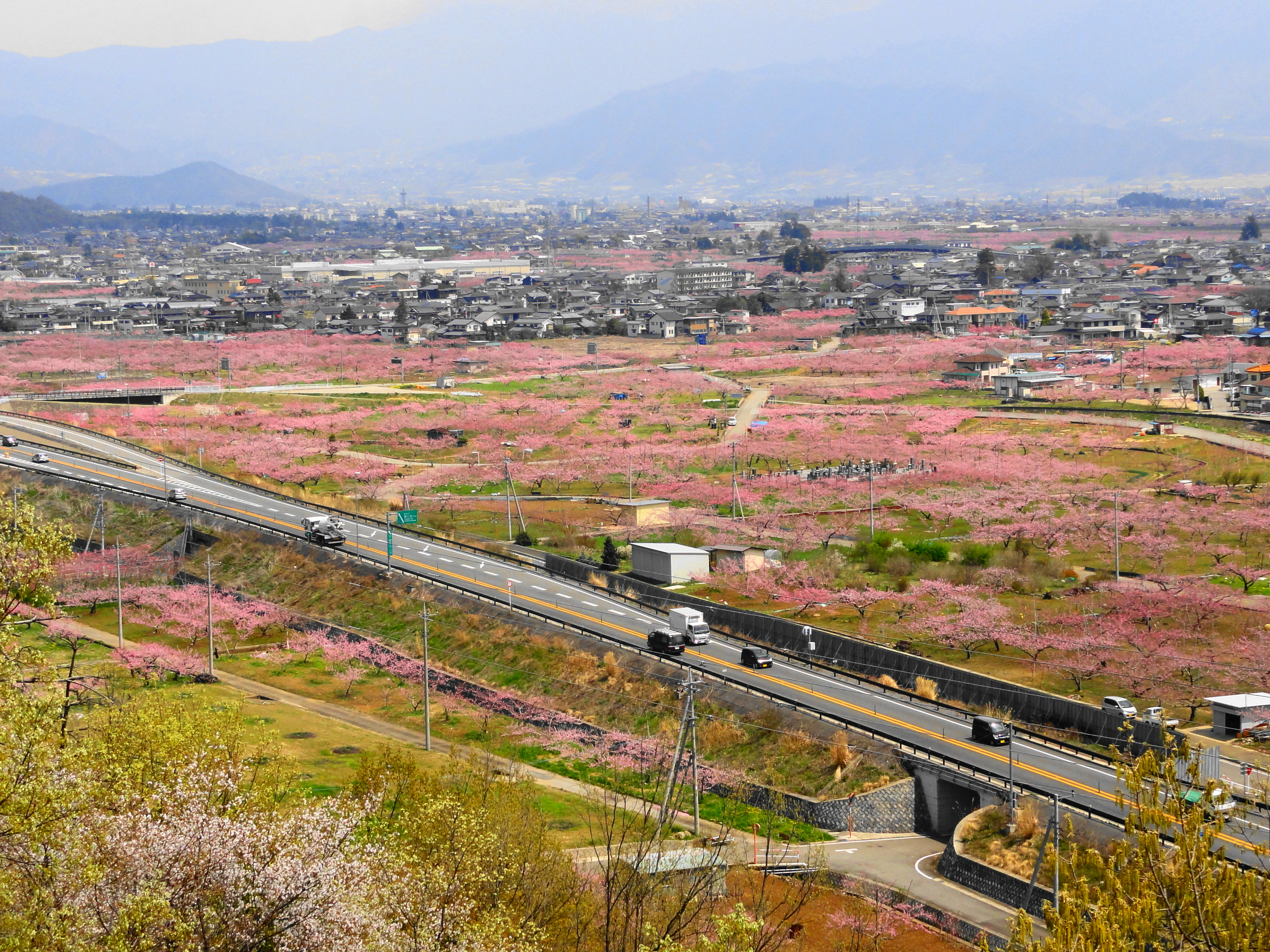 フルーツラインから春日居町を見る